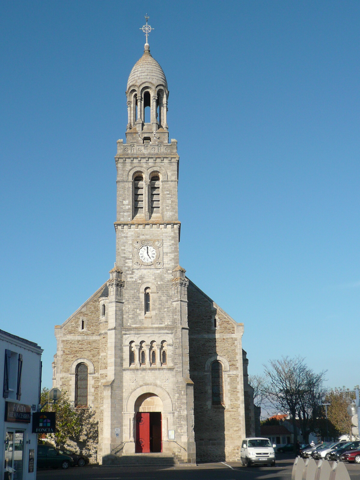 Saint-Gilles-Croix-de-Vie dans le département de la Vendée (France) : Église Sainte-Croix en octobre 2008.